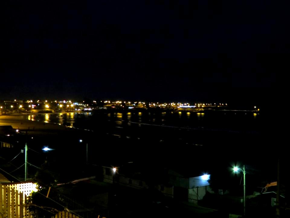 Los Vilos (mapudungún Lof = Familia o grupo de familias, Vilu = culebra) es una comuna costera ubicada en la Región de Coquimbo, Chile. Limita al norte con la comuna de Canela, al noroeste con la comuna de Illapel, al este con la comuna de Salamanca, al oeste con el Océano Pacífico y al sur con la comuna de La Ligua. Caleta de pescadores artesanales, dedicada al turismo.